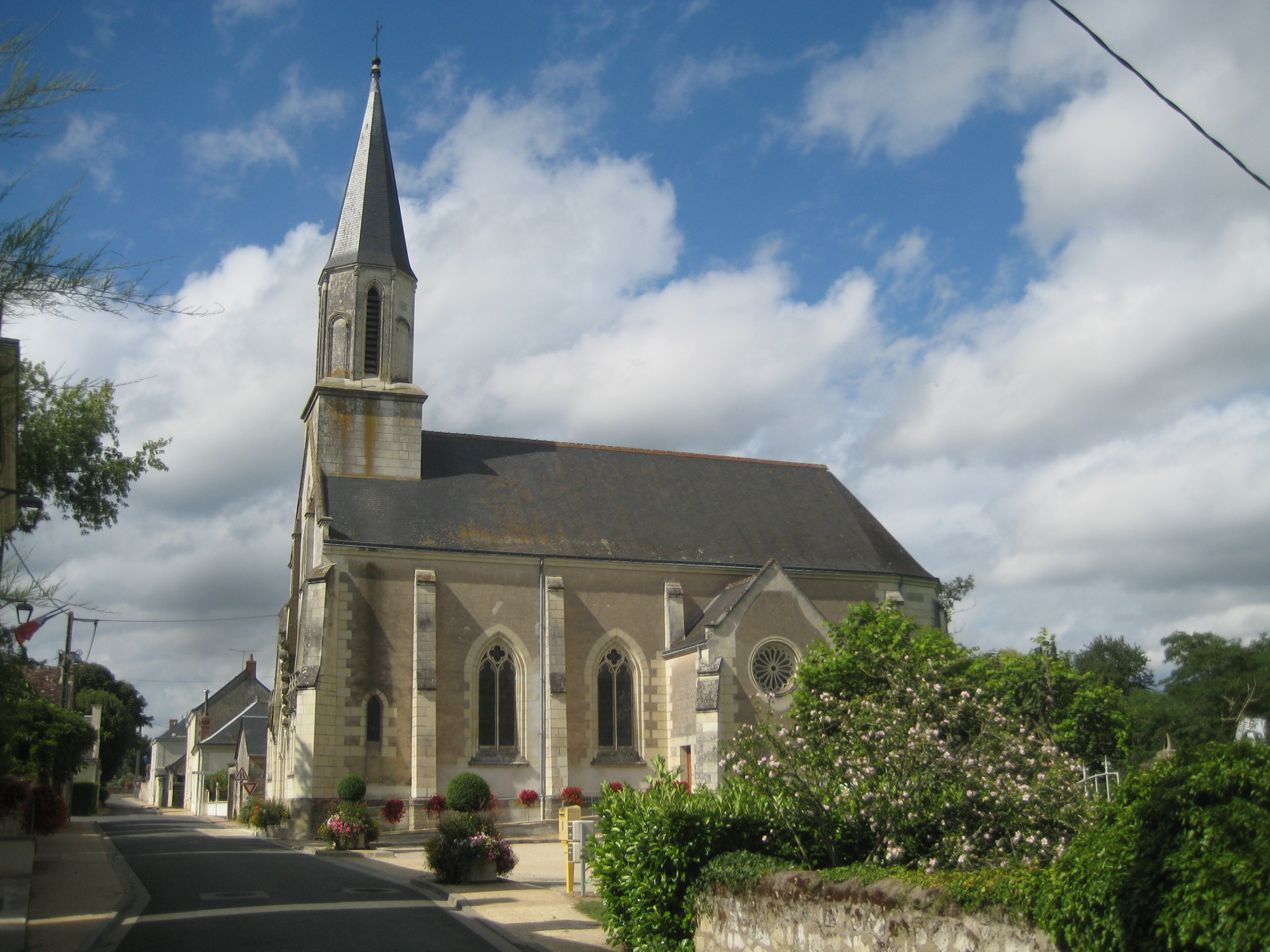 church of La Chapelle-aux-Naux